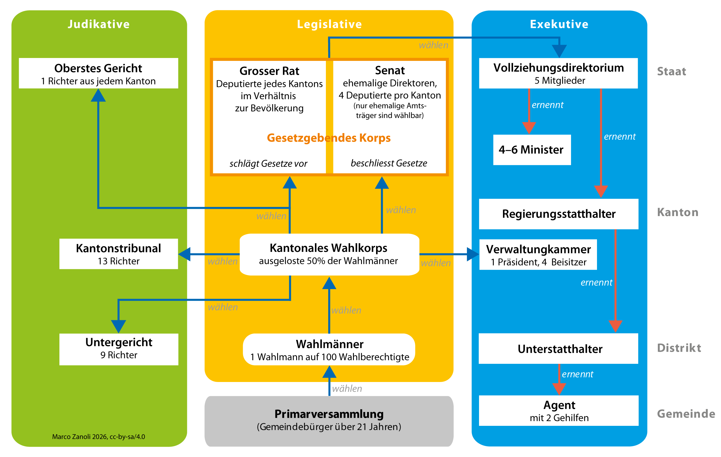 Schema der Verfassung der Helvetischen Republik (Erste Helvetische Verfassung vom 12.4.1798)